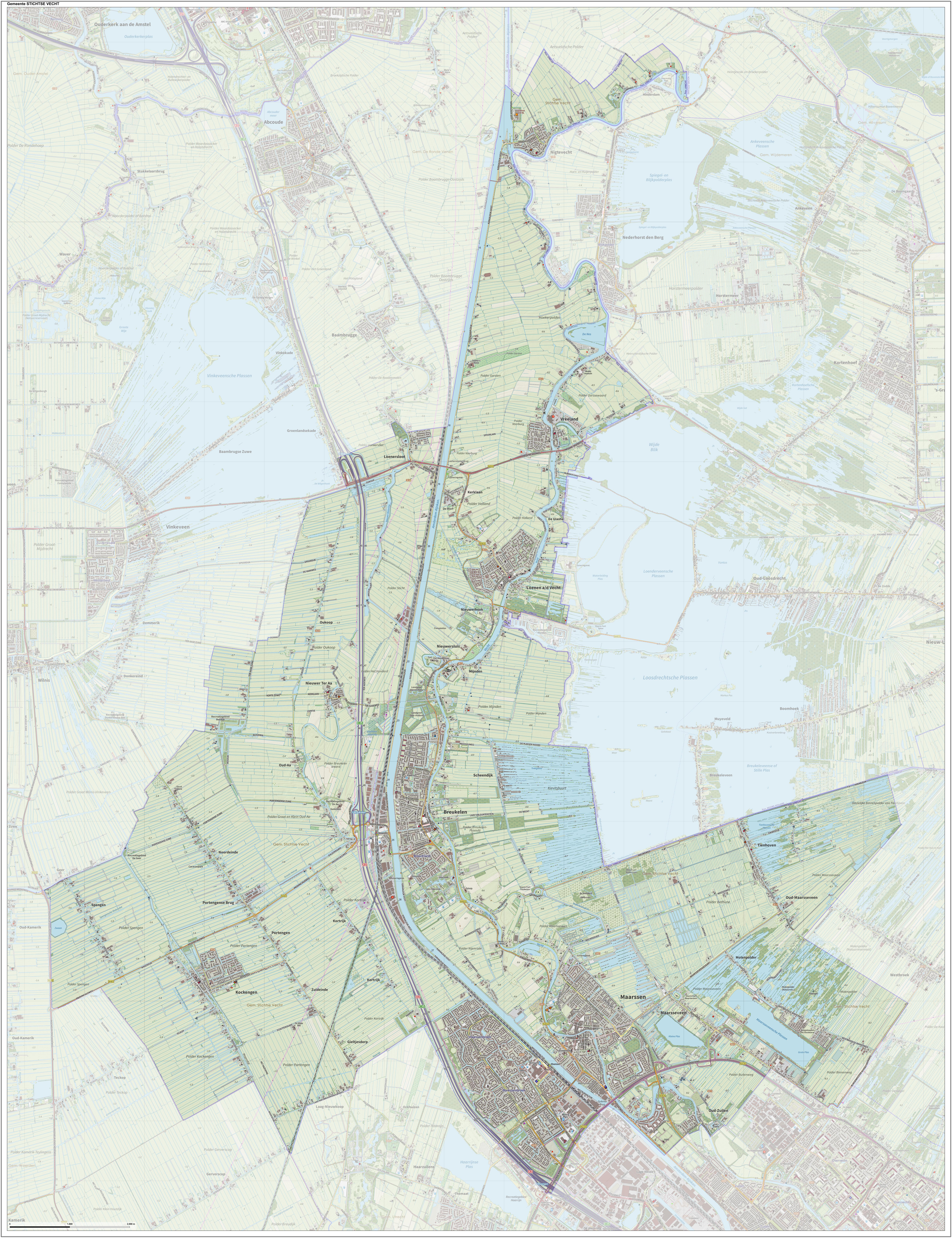 Topografische gemeentekaart. Resolutie: 400 pixels/km. Kaartbeeld samengesteld uit de open geodata van de Top10NL en Top25namen (Kadaster), Creative Commons-BY licentie. Gebouwvlakken uit open geodata BAG extract. Wegen uit de OpenStreetMap, OpenStreetMap community. Reliëfschaduw uit de Actuele Hoogtekaart AHN2. Samenstelling en kleurenschema: Jan-Willem van Aalst, met QGIS. Zie ook de Legenda.